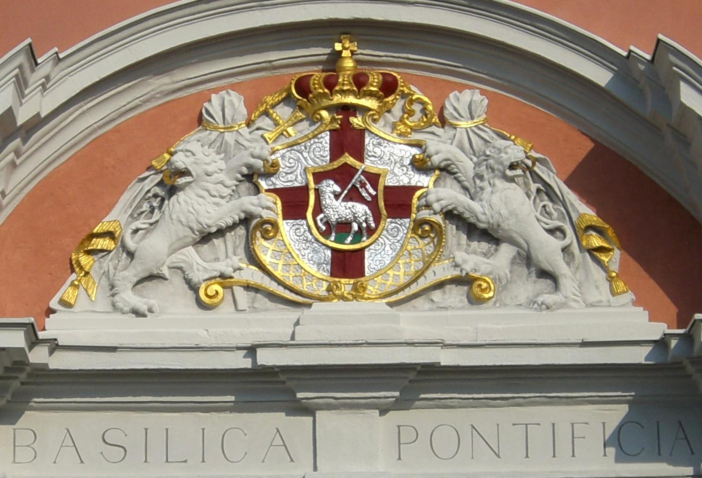 Wappen der Sankt-Salvator-Basilika (Prüm), From German WP: Wappen_der_St._Salvator_Basilika_Prüm, Quelle = eigene Aufnahme, Urheber = EJR, Datum = 14.7.06, The copyright holder of this work allows anyone to use it for any purpose including unrestricted redistribution, commercial use, and modification. Please check the source to verify that this is correct. In particular, note that publication on the Internet, like publication by any other means, does not in itself imply permission to redistribute. Files without valid permission should be tagged with subst:npd . Usage notes: • If the work requires attribution, use Attribution instead • If this is your own work, please use Cc-zero instead Copyrighted free use //commons.wikimedia.org/wiki/File:Wappen_der_St._Salvator_Basilika_Pr%C3%BCm.jpg